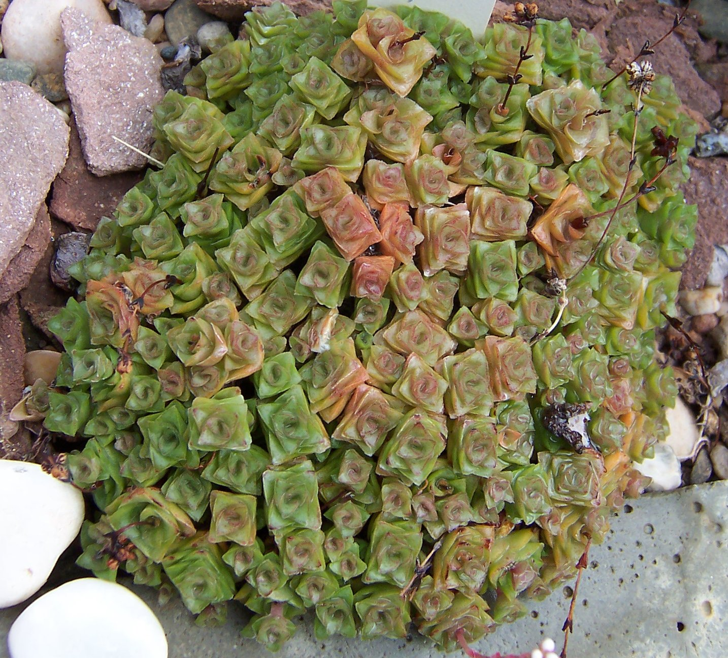 Crassula socialis, habitus